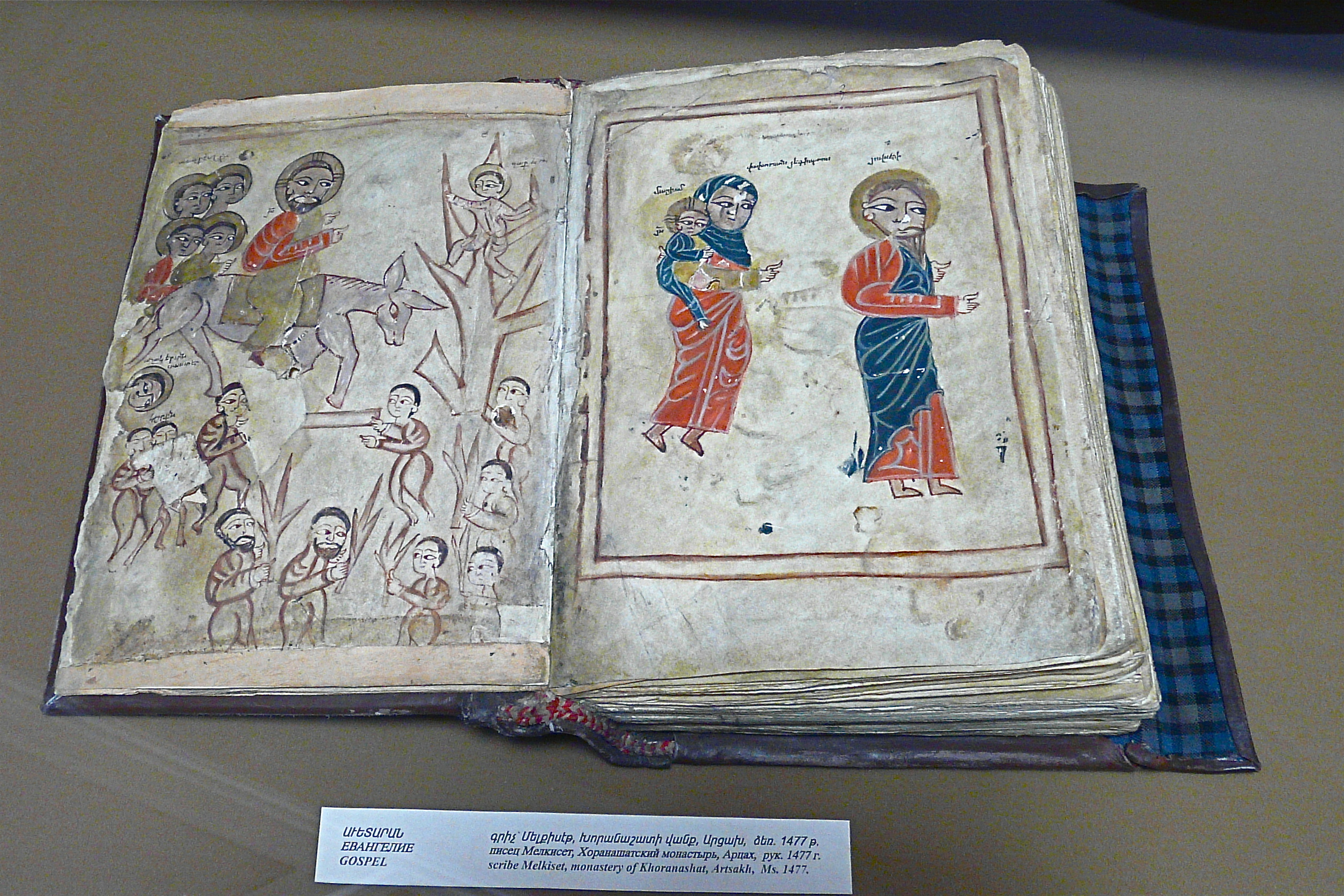 Matenadaran - Het manuscriptenmuseum. Voor het museum bevindt zich een standbeeld van Mesrop Mashtots, de ontwerper van het Armeens alfabet. Het museum herbergt 16000 oude en verlichte manuscripten. Het oudste "Het evangelie van Lazarus" uit 887. Het grootste: 34 kg wegend en gemaakt van 700 koeievellen en tevens het kleinste evangelie: 12 gram wegend en 3x4cm groot. Zie ook